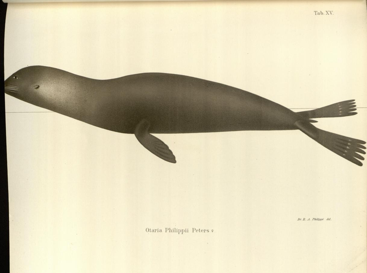 Tab.XY. /);: R..A. FkOipm deL Otaria Philippii Peters 9